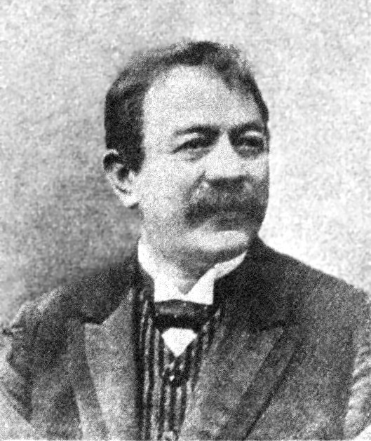 Österreichischer Politiker, Reichsratswahl 1907, Name siehe Dateiname